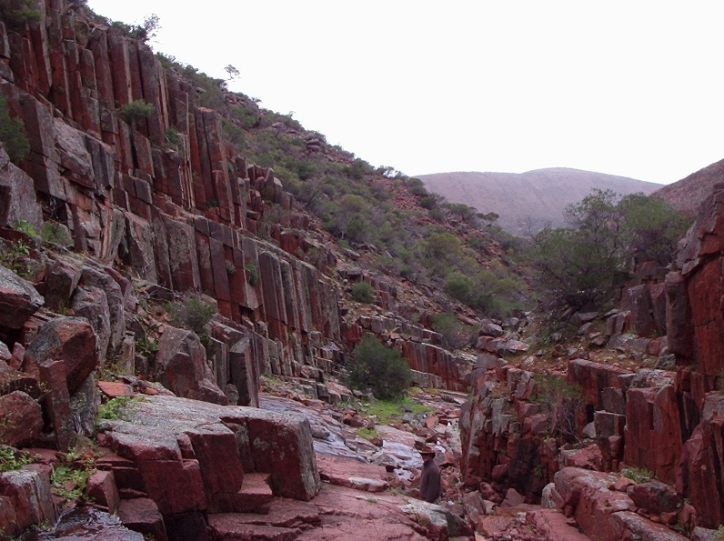 Les tuyaux d'orgues dans la chaine Gawler en Australie méridionale